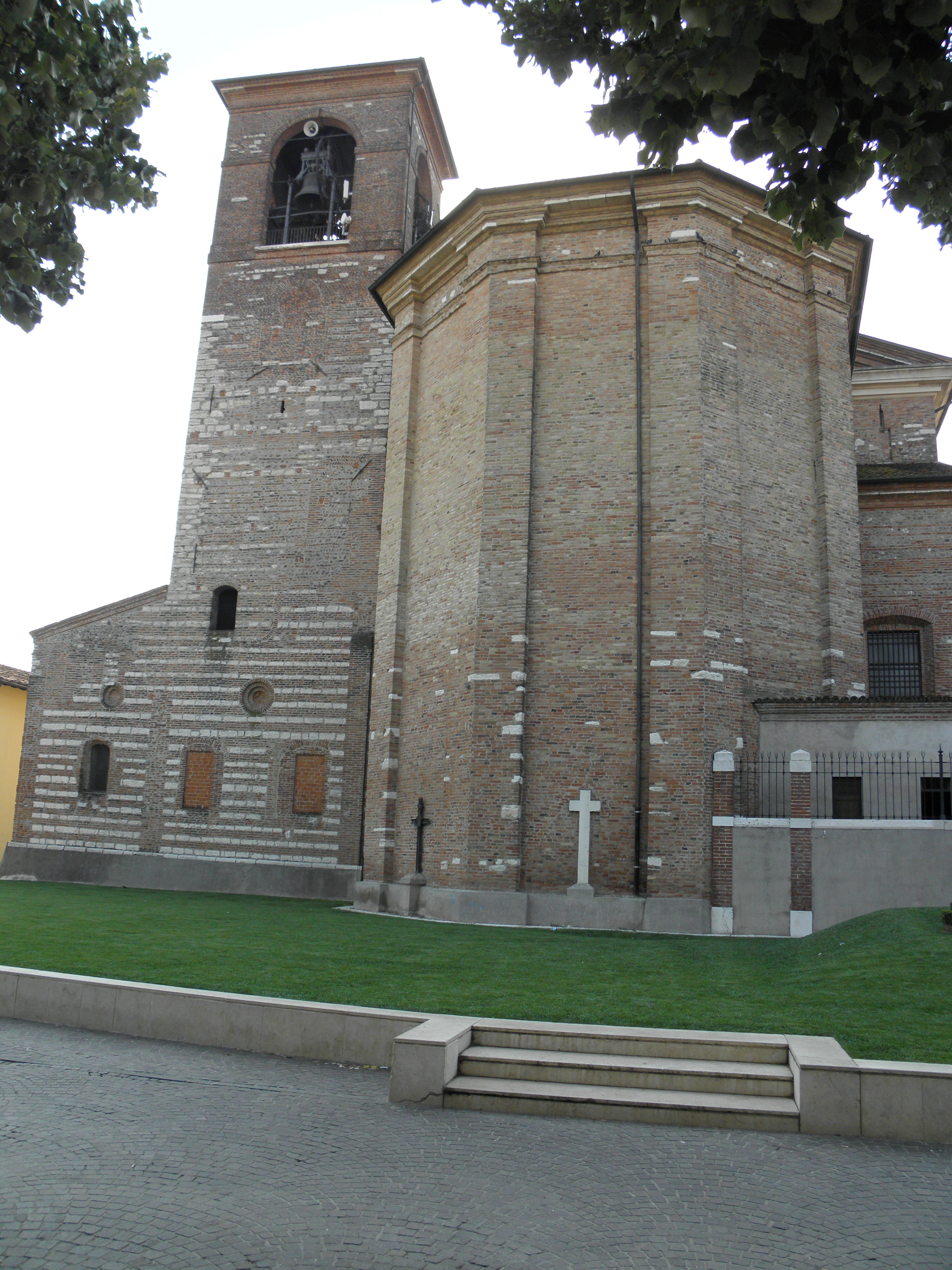 Ghedi, Chiesa parrocchiale di Santa Maria Assunta: campanile ed abside.